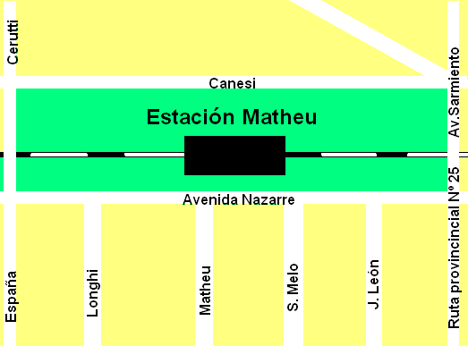 Mapa de la estación ferroviaria Matheu y alrededores.